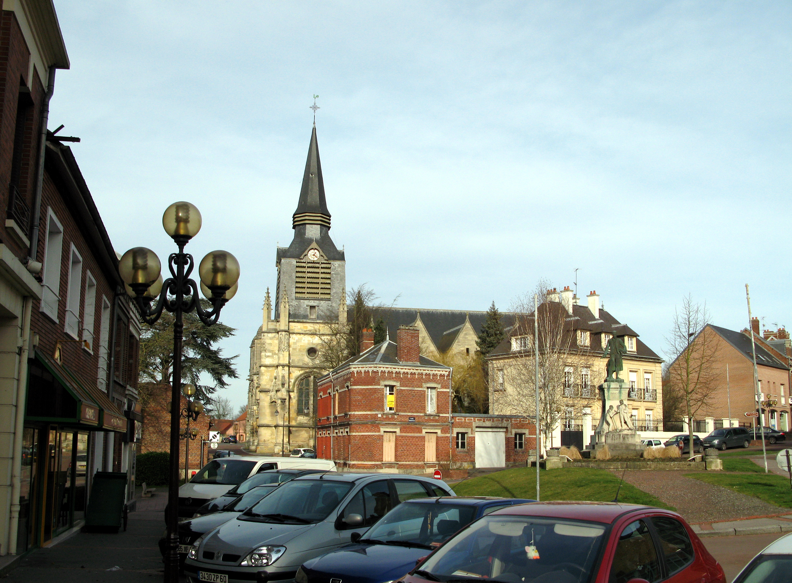 Montdidier (Somme, France) - La Place Parmentier avec, en arrière-plan, l'église Saint-Pierre et à droite la statue de Parmentier. . .